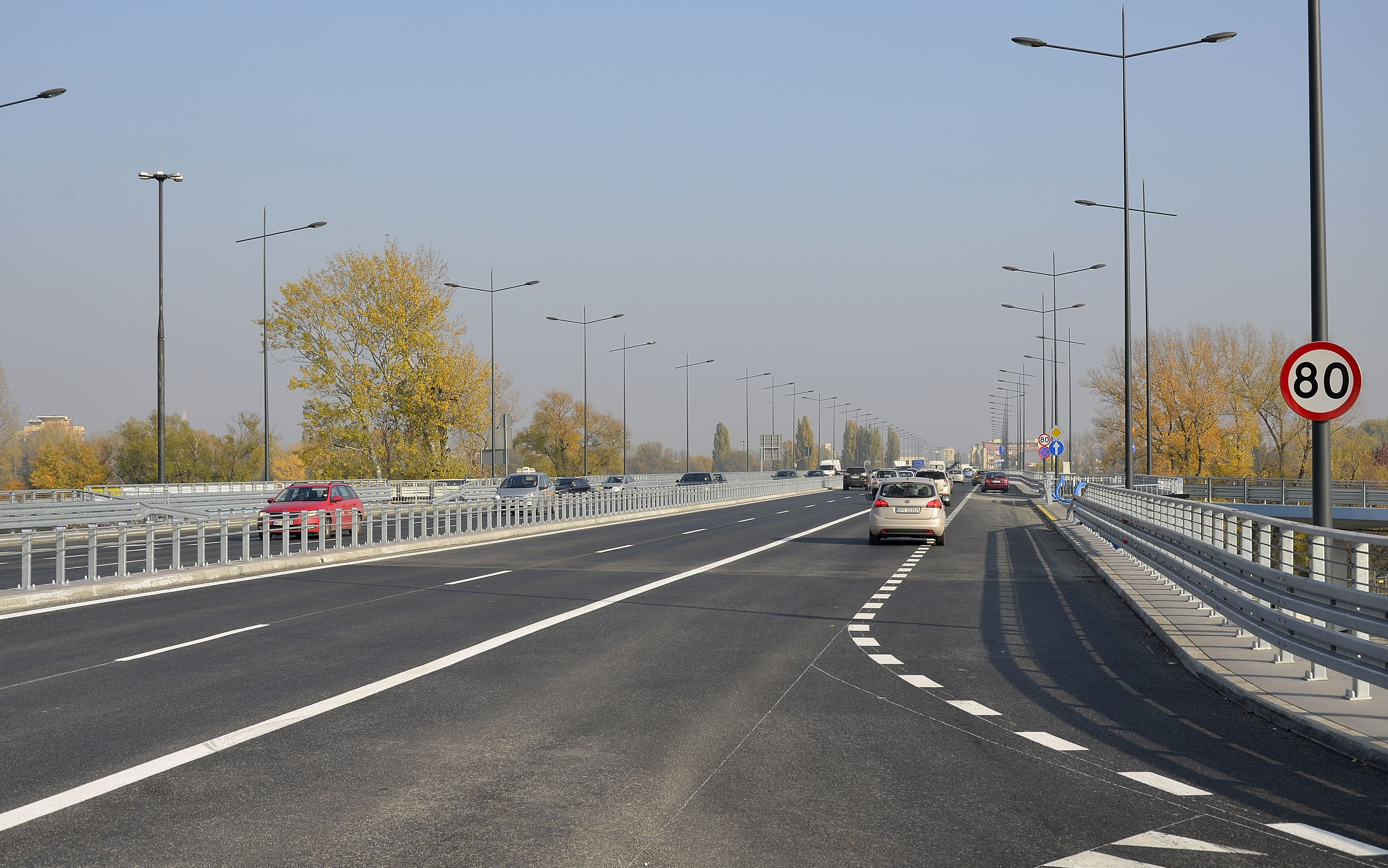 Wjazd na most Łazienkowski w Warszawie